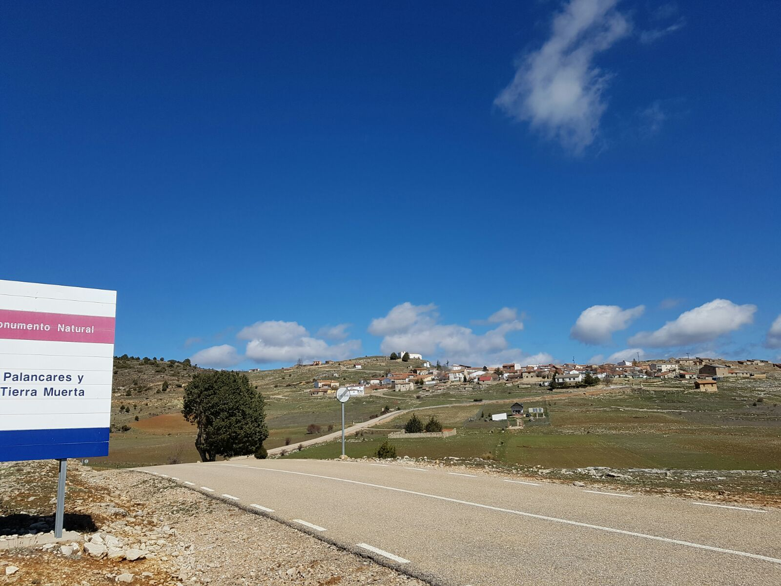 La Cierva, pueblo de Cuenca, y Tierra Muerta